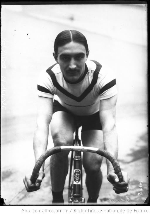 Marcel Godivier portrait du coureur cycliste avant le départ